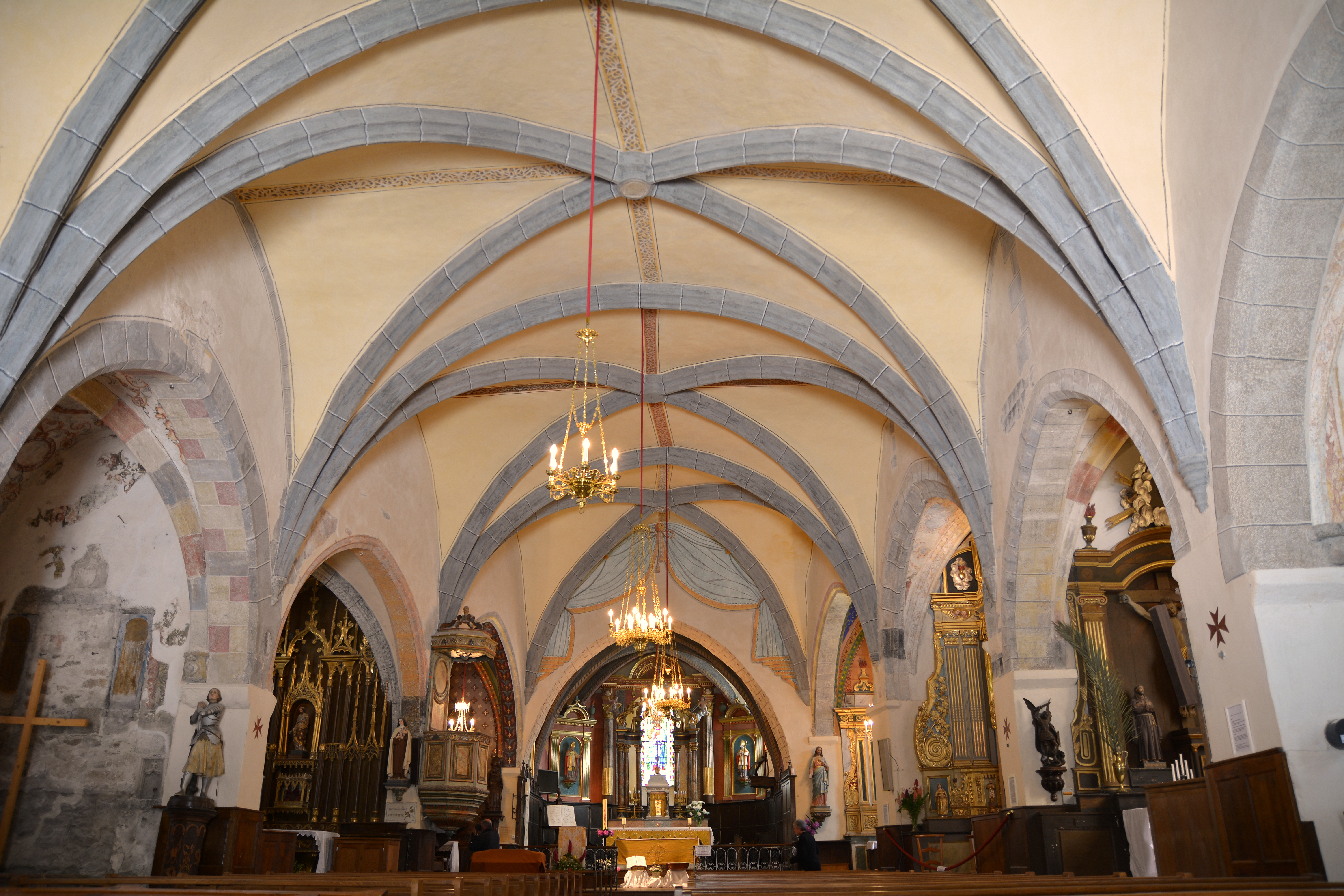 Église de Marcolès, Cantal Auvergne, France